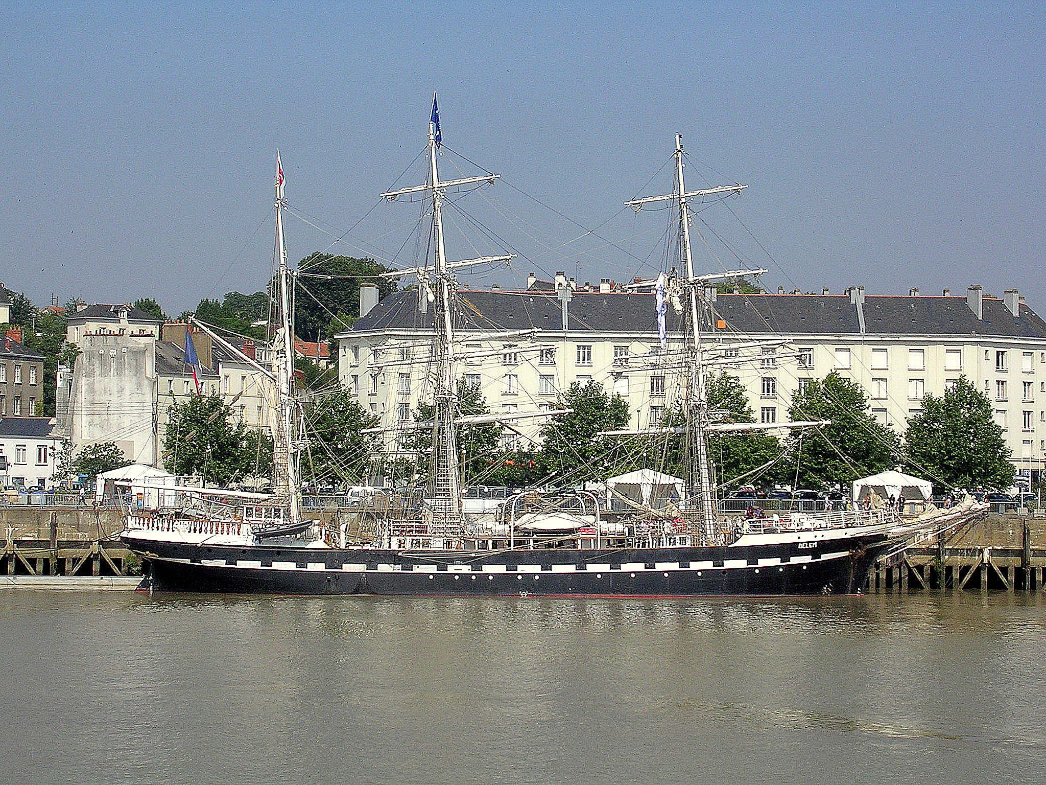 Belem amarré au ponton Belem du port de Nantes